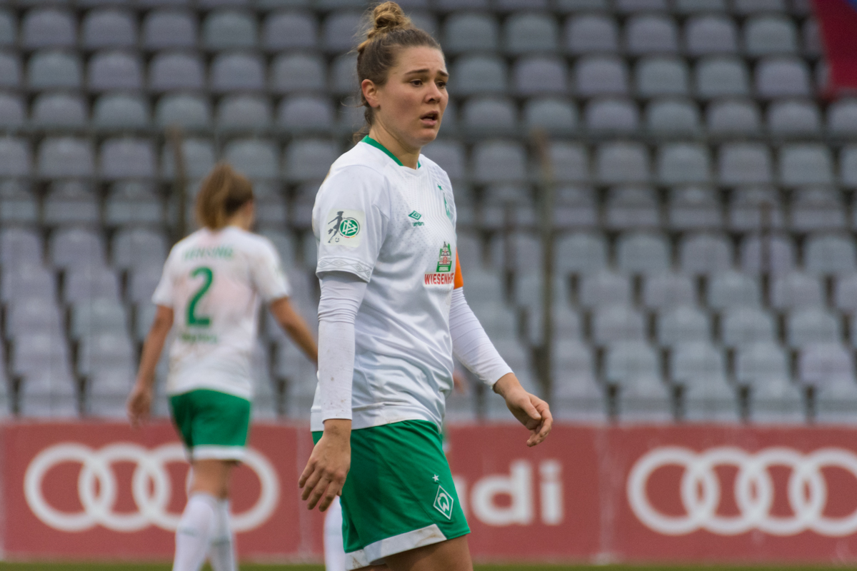 Lisa-Marie Scholz during the Bundesliga match vs FC Bayern